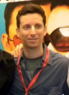 Ben Shenkman na Comic-Con 2009